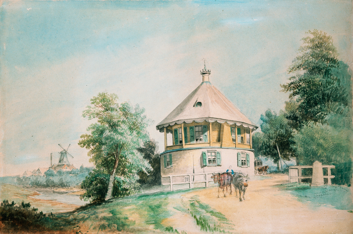 Het Koerhuis bij Deventer door A.A.C. van 't Zant (kort) voor de afbraak in 1866